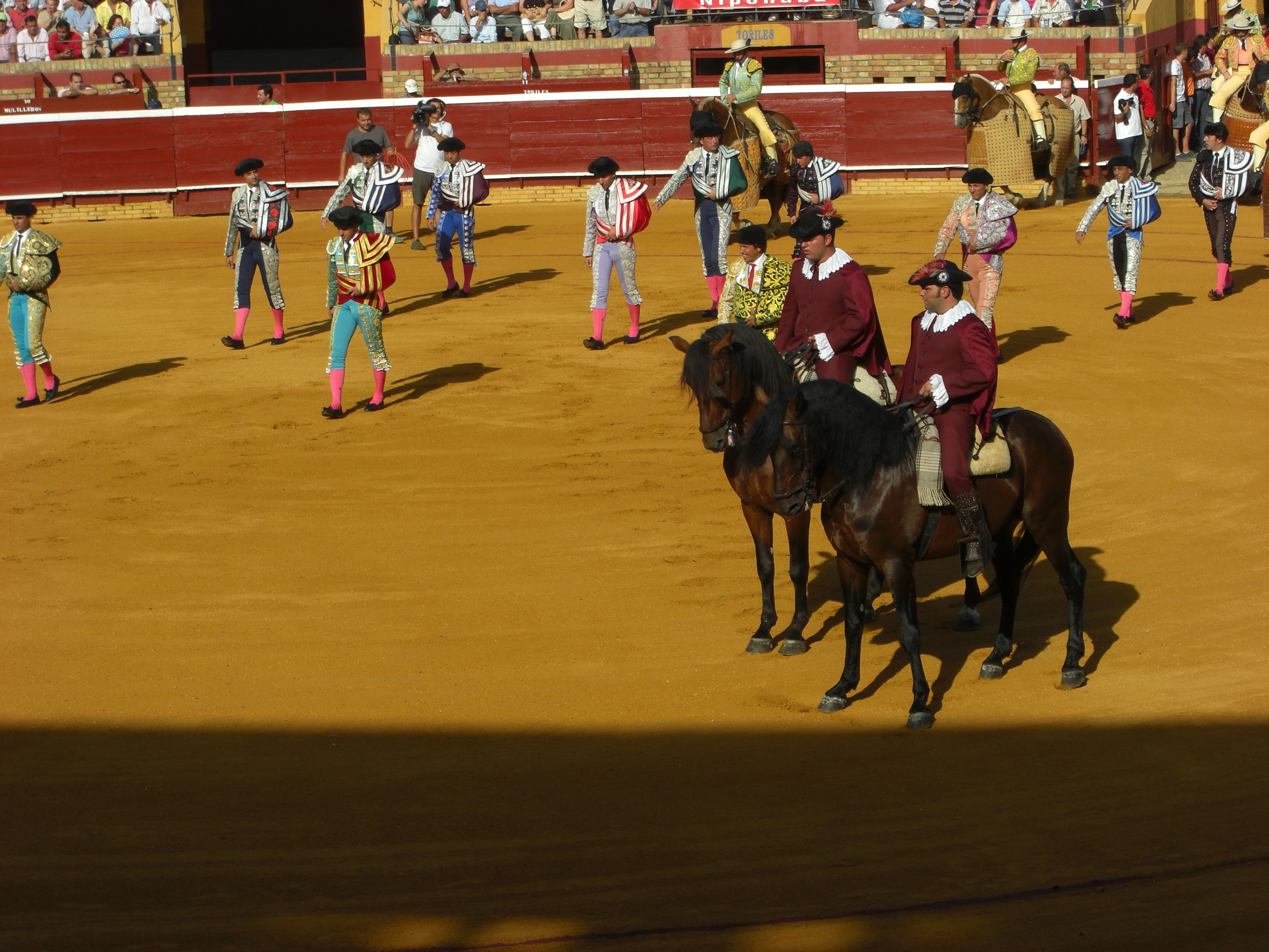 Desfile antes de la corrida en las fiestas Colombinas 2008 en Huelva (España).